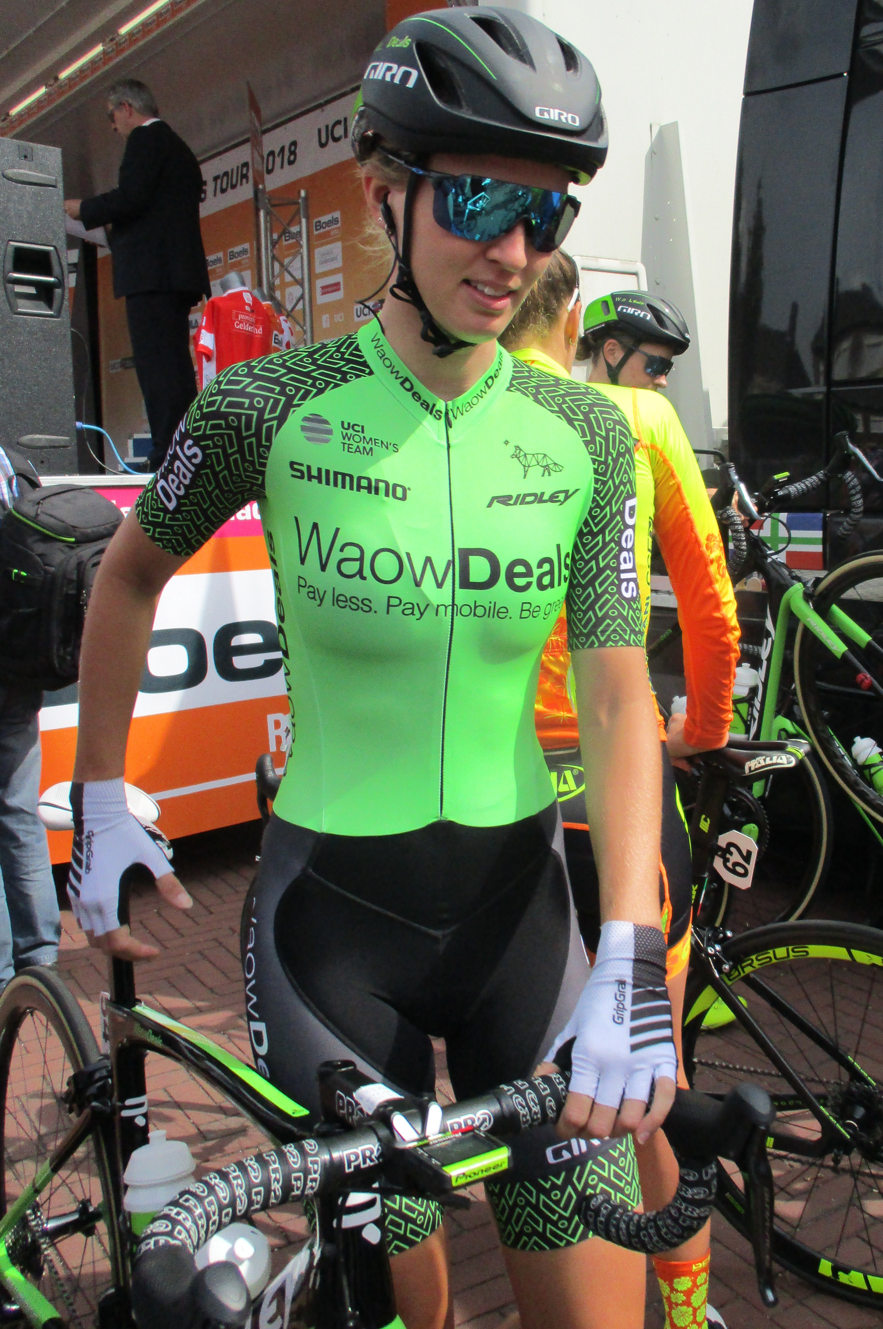 4e etappe van de Boels Ladies Tour 2018 door Noord-Limburg, start in Stramproy.